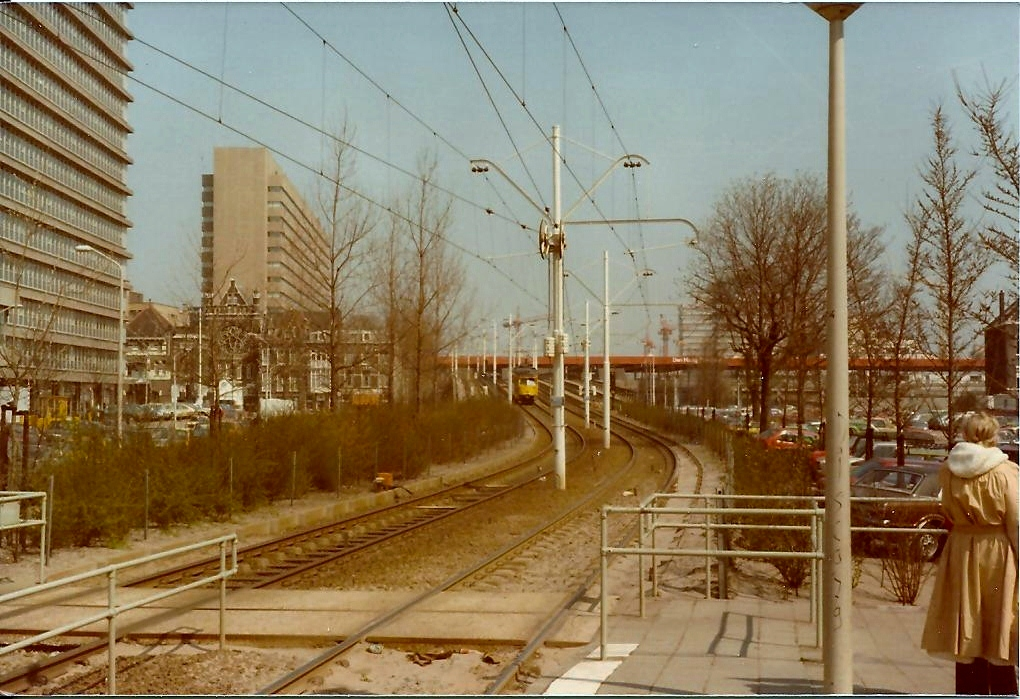 Halte Muzenstraat bij het begin van de helling naar CS, Den Haag. Situatie van voor de tramtunnel werkzaamheden. De kerk aan de linkerkant is de Oosterkerk aan de Oranje Buitensingel.